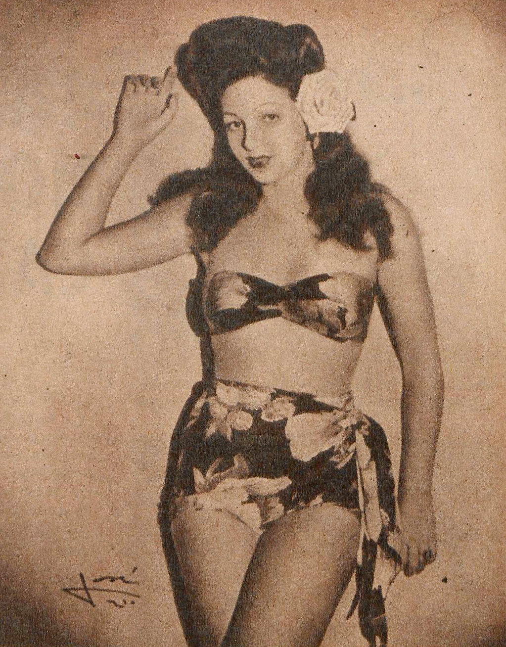 A atriz e cantora brasileira, Leonora Amar (1926-2014), em 1945.